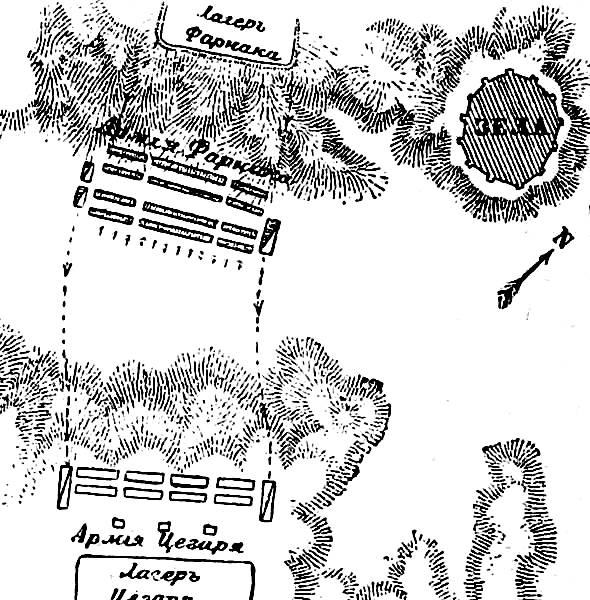 Это изображение было использовано для иллюстрирования статьи «Зела» (Зила) опубликованной в десятом томе «Военной энциклопедии», который был издан книгоиздательским товариществом И. Д. Сытина в 1912—1913 гг. в столице Российской империи городе Санкт-Петербурге.